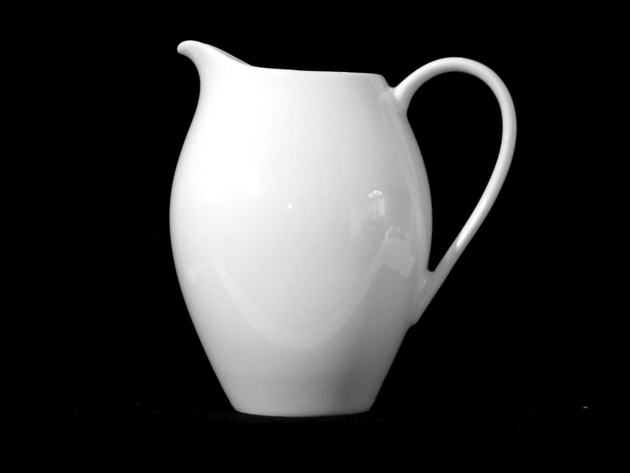 Krug aus der Serie "Form 2000" der Arzberg Porzellan Fabrik, Design Heinrich Löffelhardt. - Kanne mit Schnauzen-Ausgussform